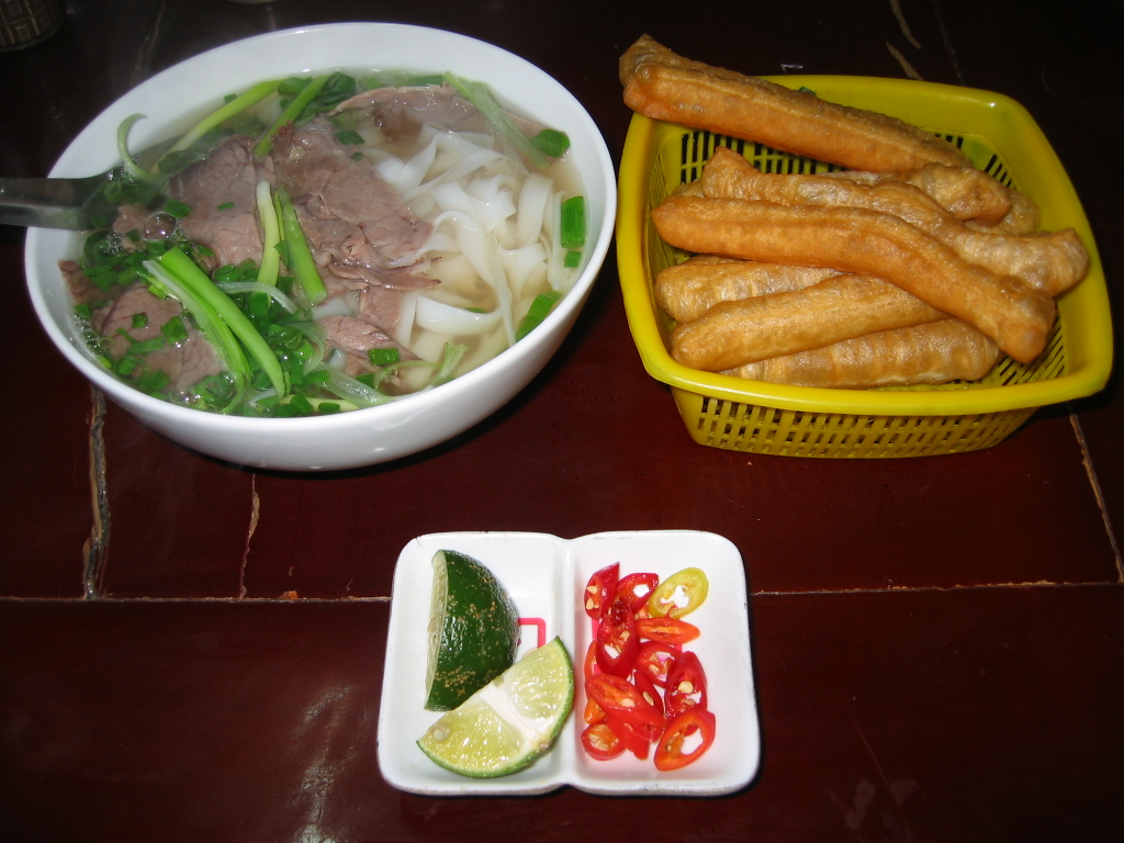 Một bát phở bò chín ăn cùng quẩy